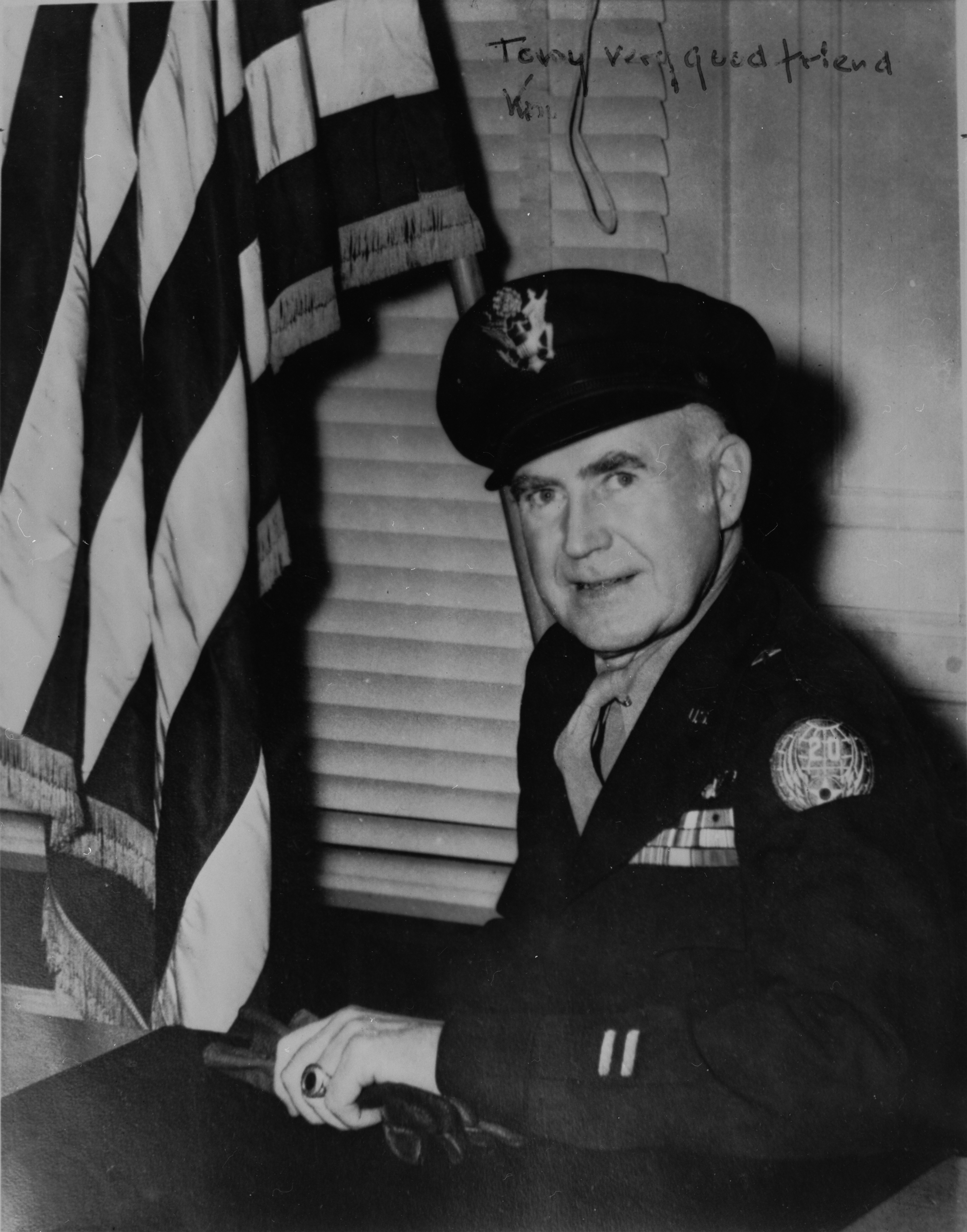 Porträtt av Brigadgeneral Erik Nelson.